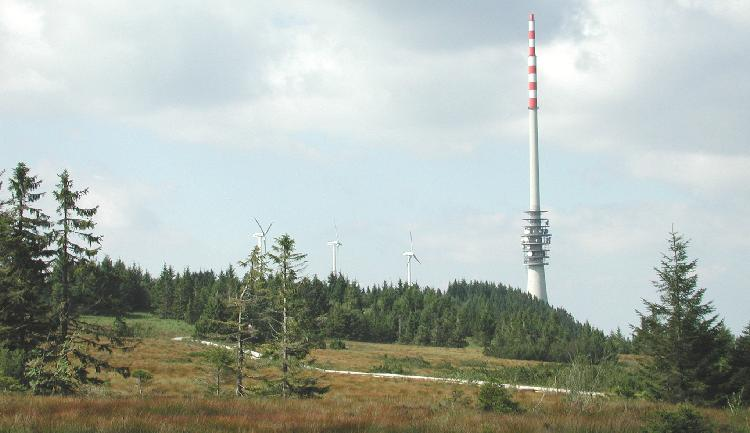 Hochfläche der Hornisgrinde im Jahr 2004 Foto: M. Linnenbach, GNU FDL